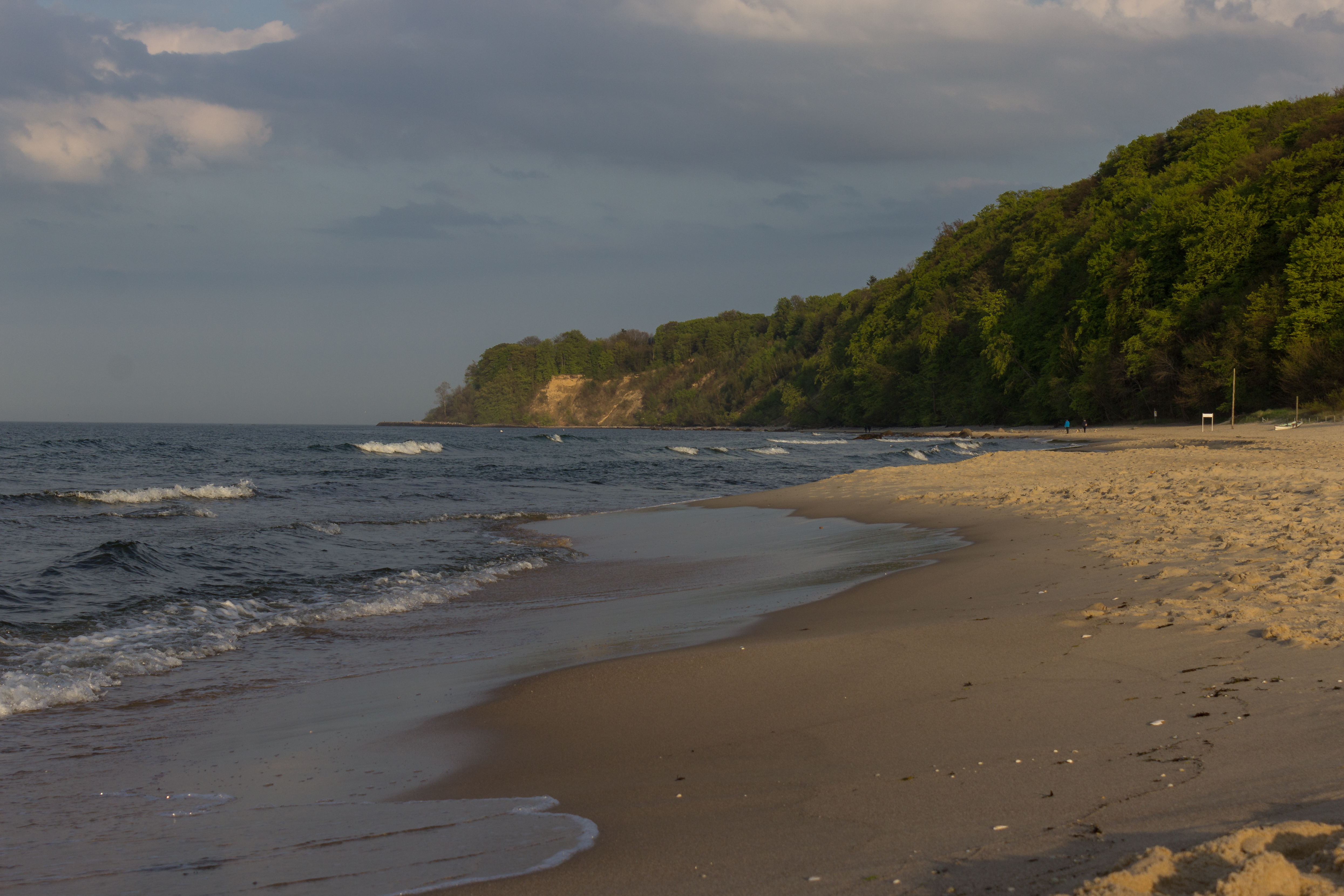 Biosphärenreservat Südost-Rügen (NSG Mönchgut) Nordperd - Göhren - Mecklenburg-Vorpommern